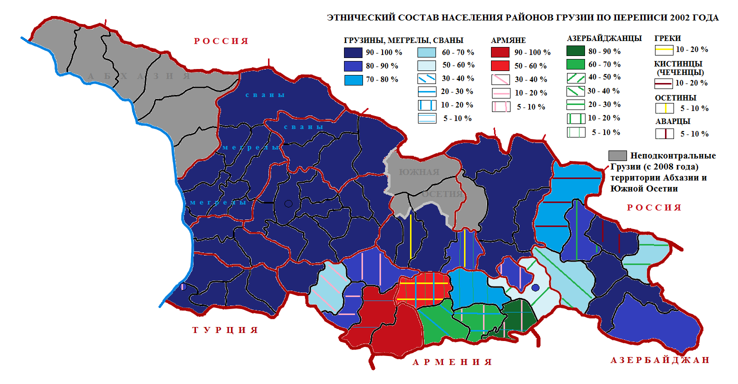 Этническая карта районов (муниципалитетов) Грузии по переписи населения 2002 года